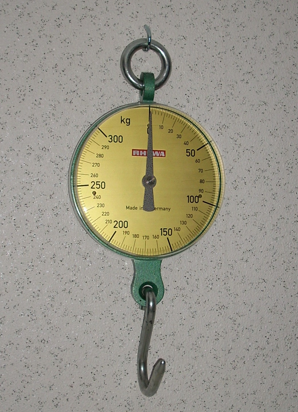 RHEWA-Zeigerschnellwaage, 0 - 300 kg, Skalenteilung 1 kg